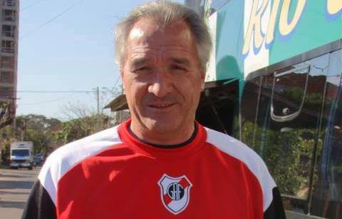 Bianco